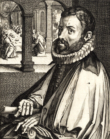 Anthonie van Blocklandt